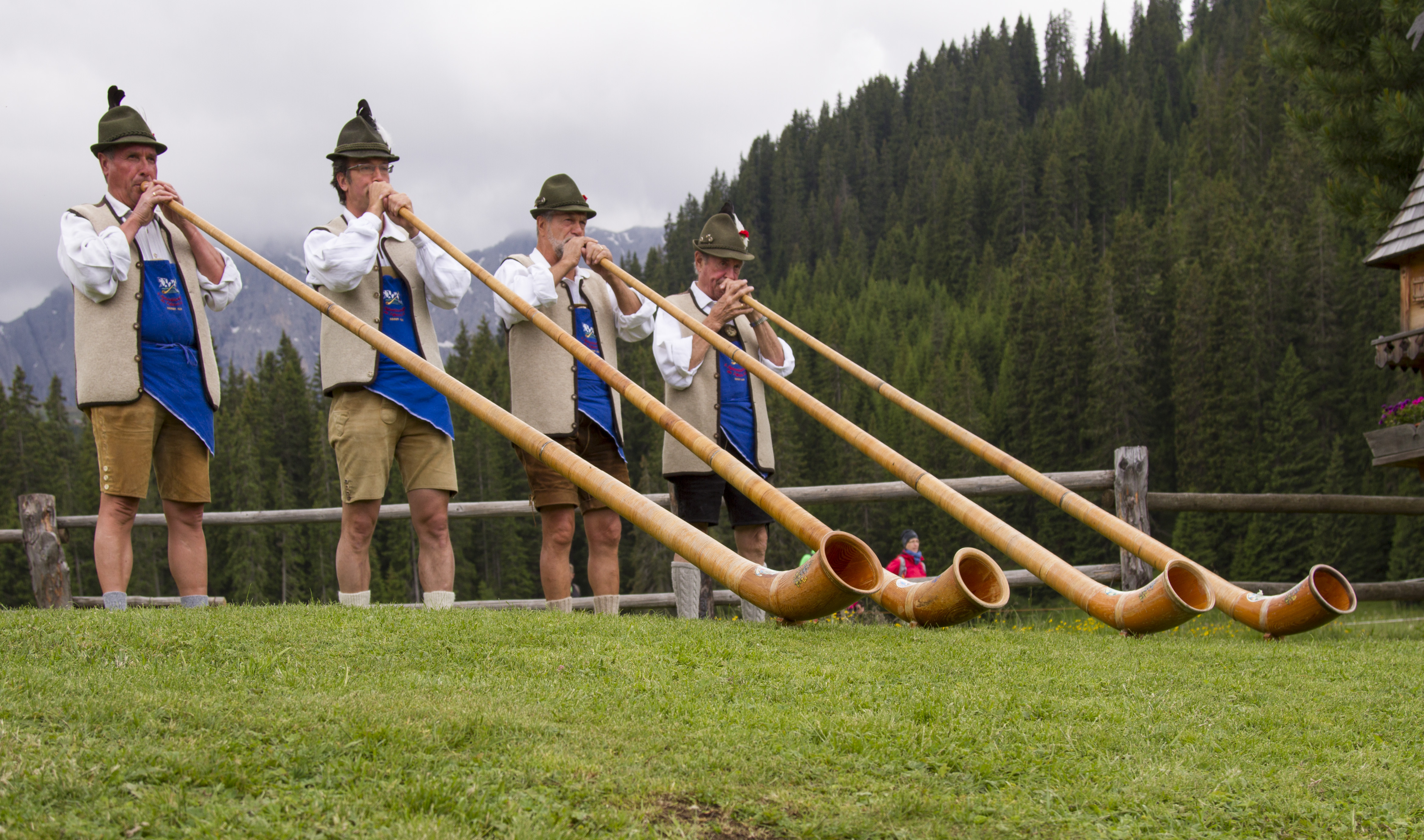 Vier Alphorn blazers in traditionele kleding op de Seiseralm in Zuid-Tirol. This photo has been taken in the country: Italy